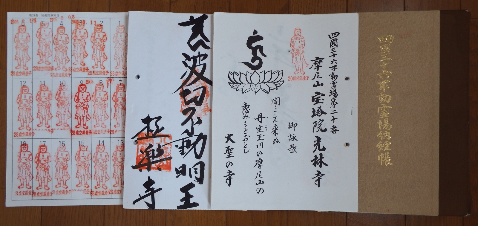 四国不動霊場のバインダー納経帳